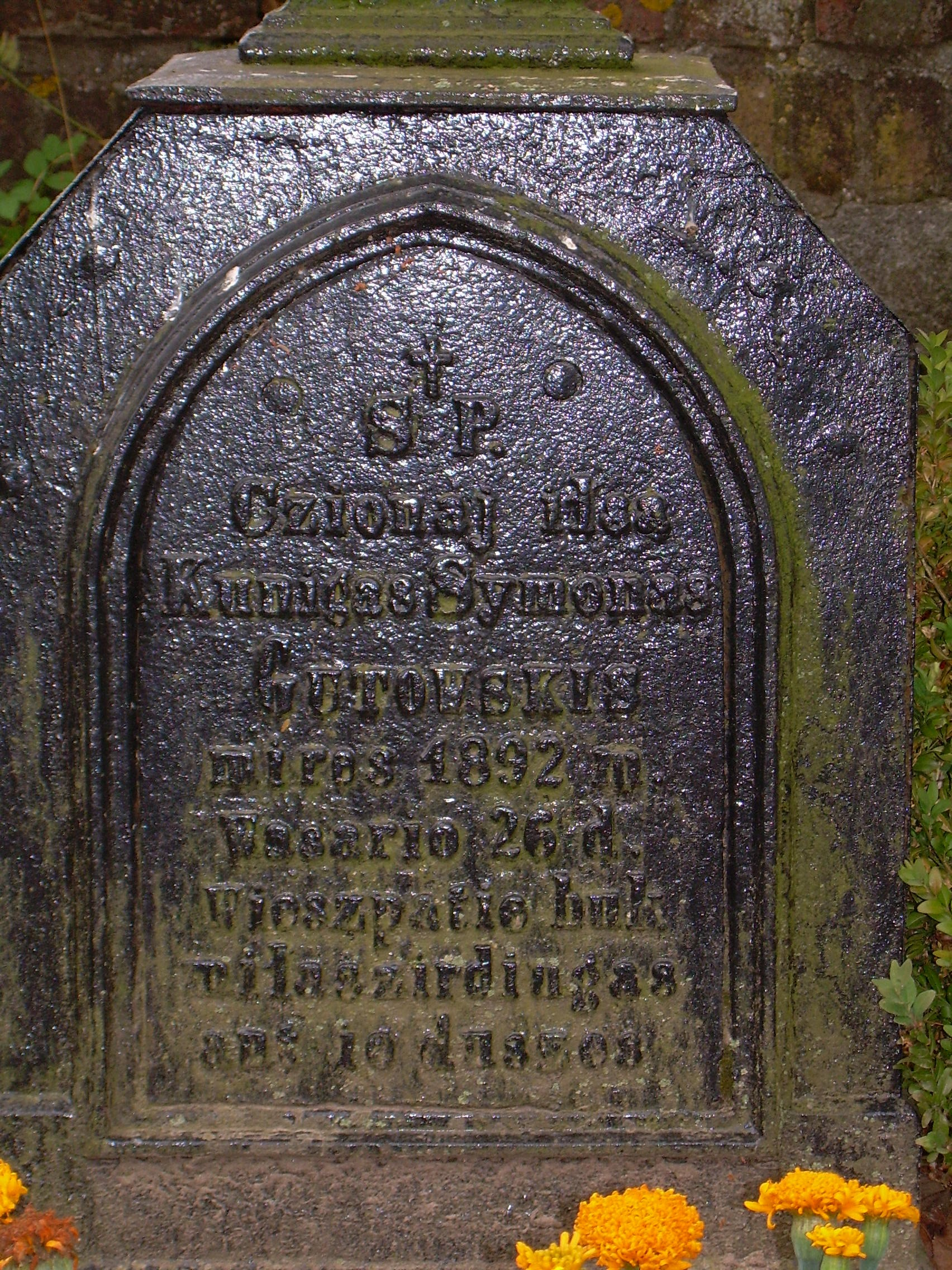 Šateikių Šv. evangelisto Morkaus bažnyčia